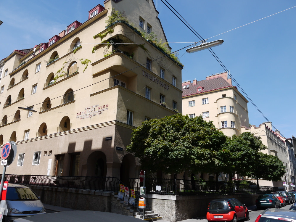 Thuryhof - Wohnhausanlage der Gemeinde Wien